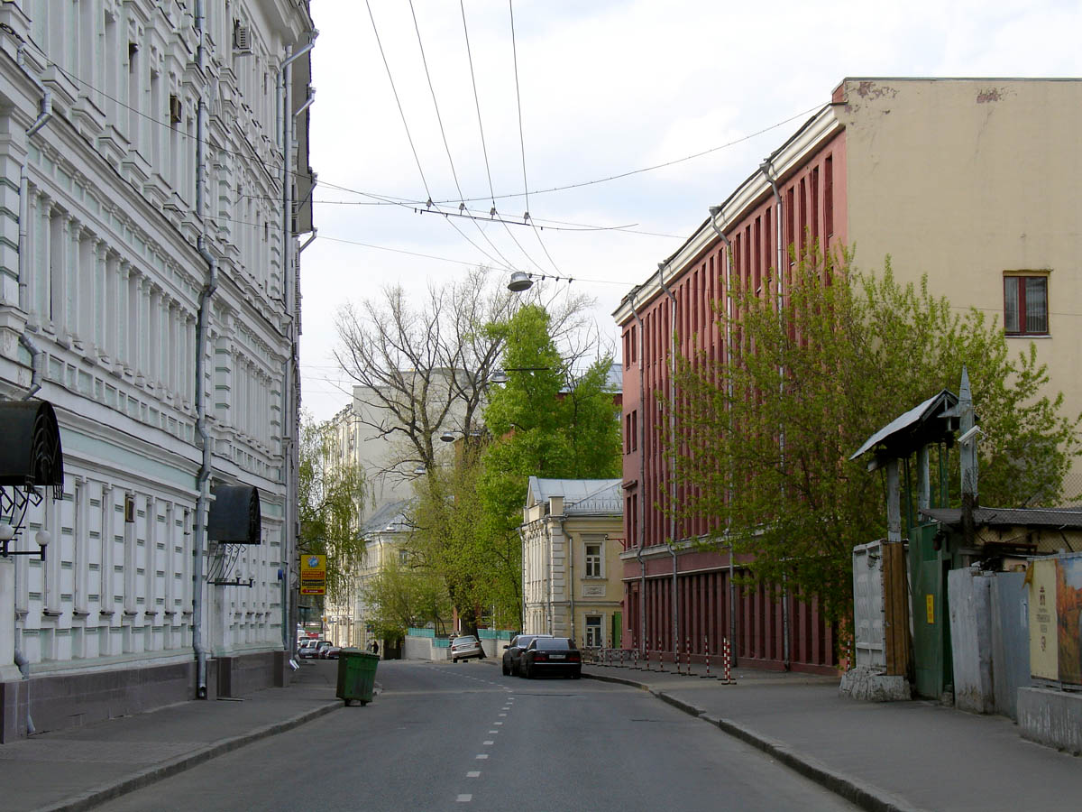 Staromonetny Lane, MoscowСтаромонетный переулок, вид к северу от Большого Толмачевского переулка.